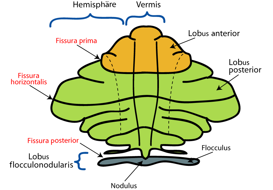 Gliederung des Kleinhirns